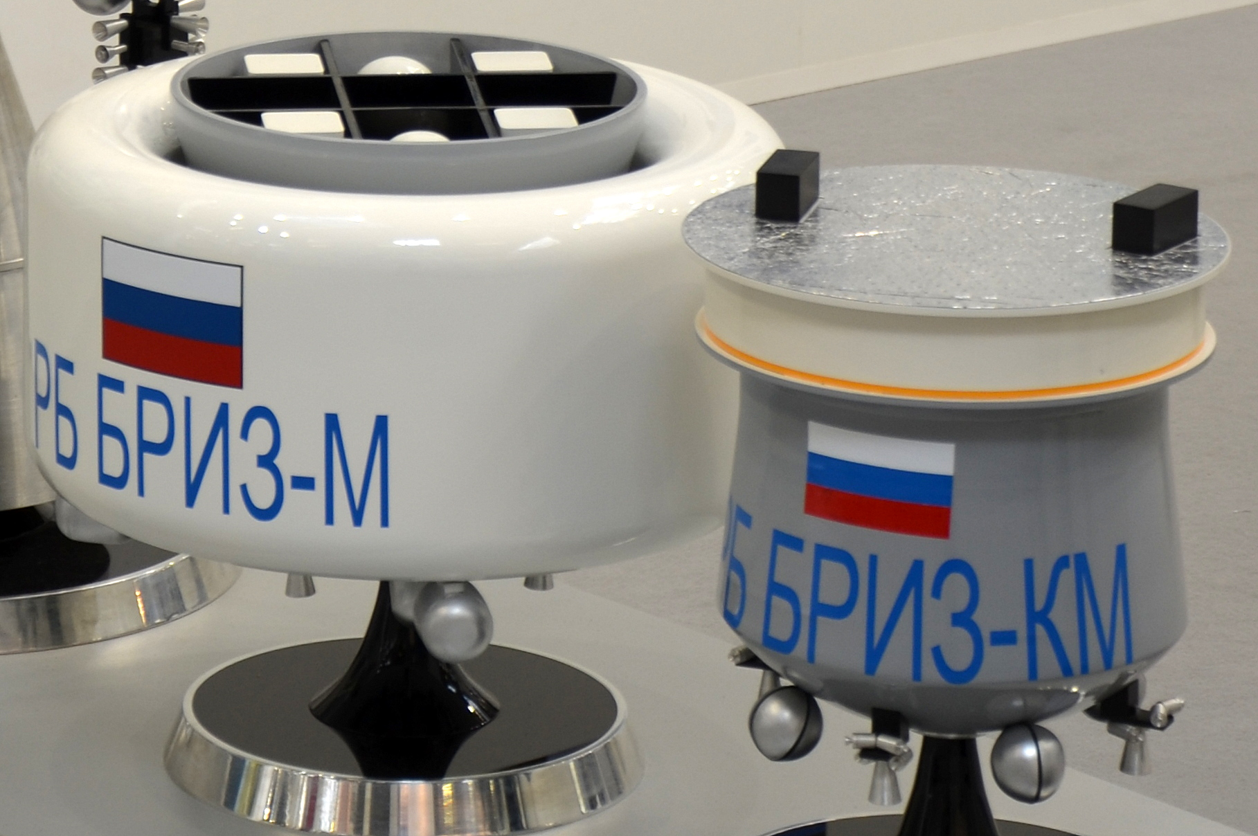 Maquettes étages supérieurs de fusée russes Briz M et KM exposés au Salon du Bourget 2013